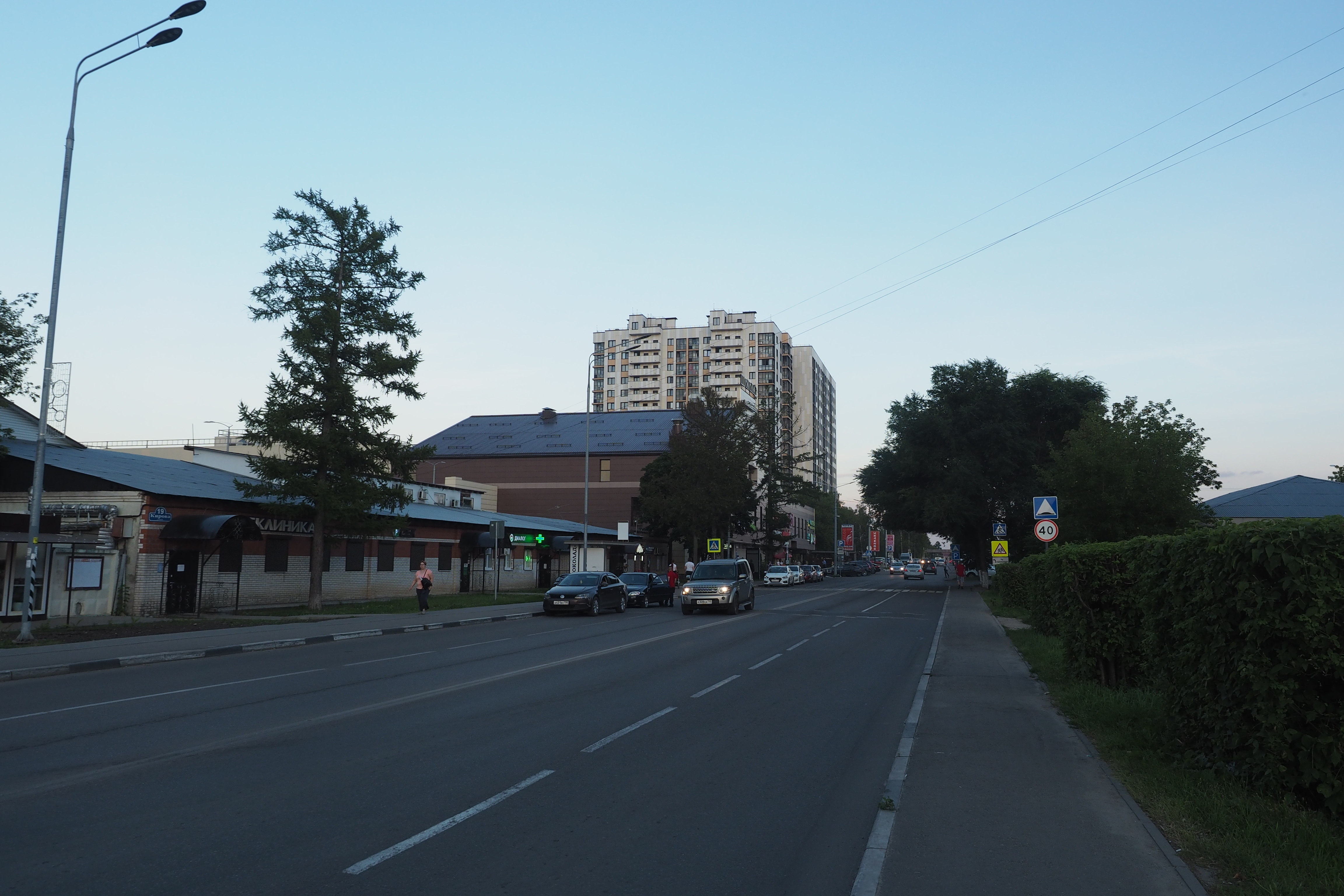 Старая Купавна улица Кирова